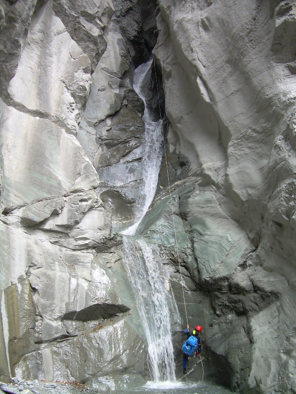 Discesa nella parte superiore della forra